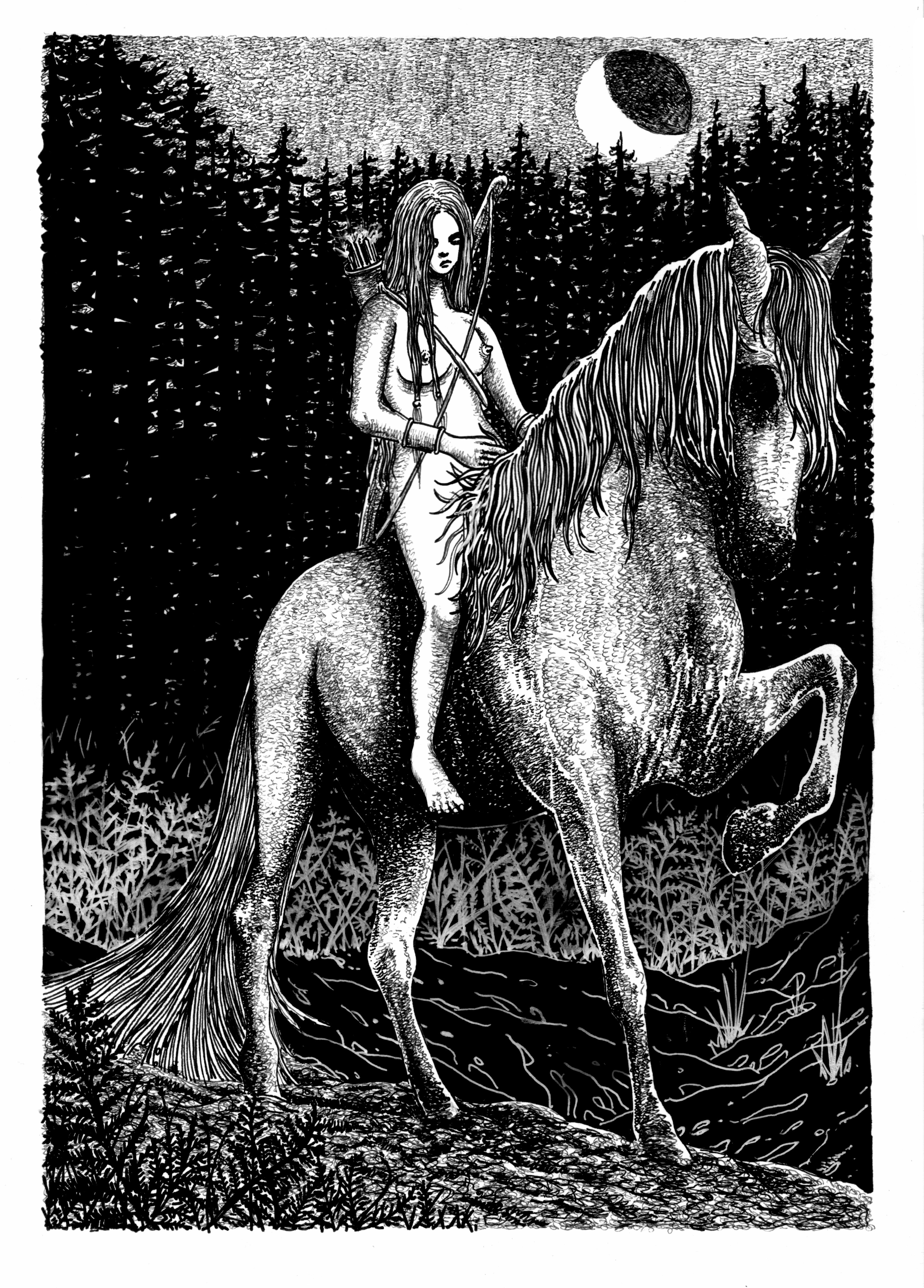 Dziewanna autorstwa Andy'ego Paciorka.